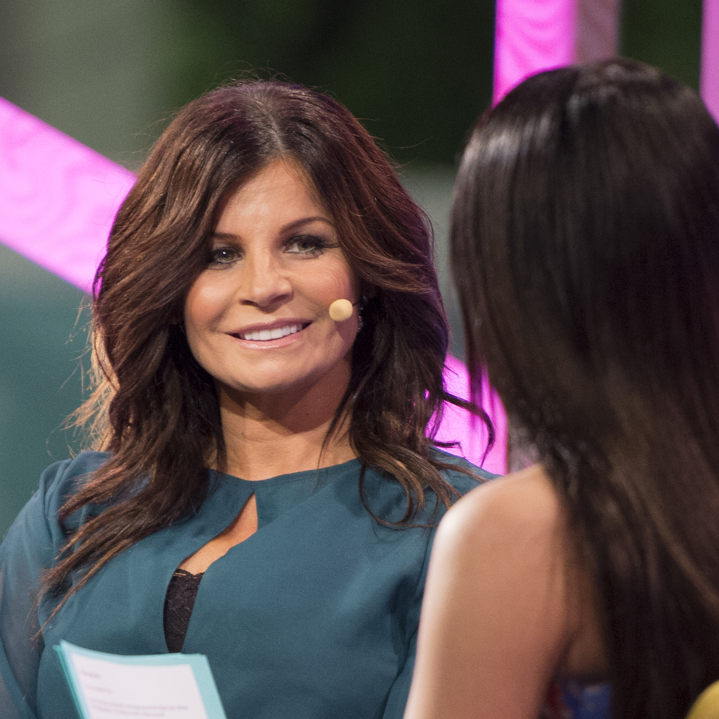 Carola intervjuas av Gina Dirawi i SVT-programmet "Studio Eurovision" 2013.